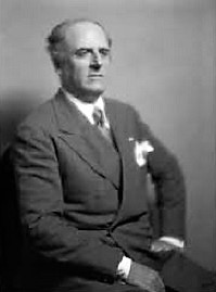 Archimede Bresciani